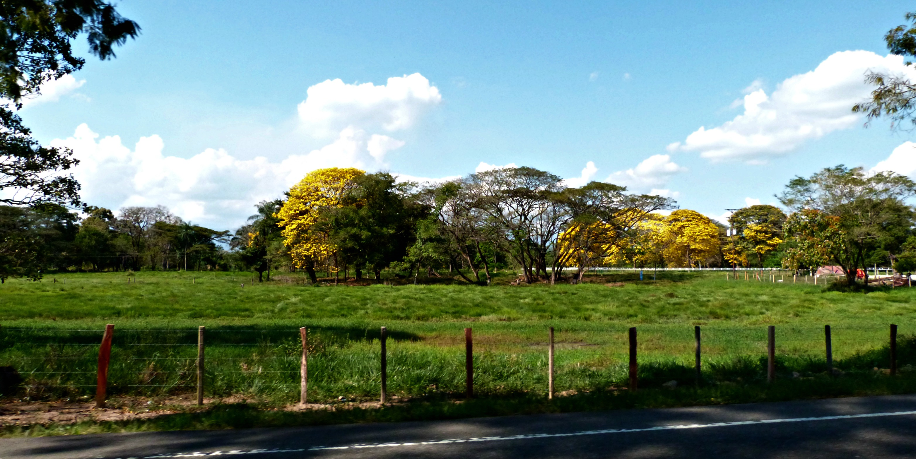 Hacienda Barinas